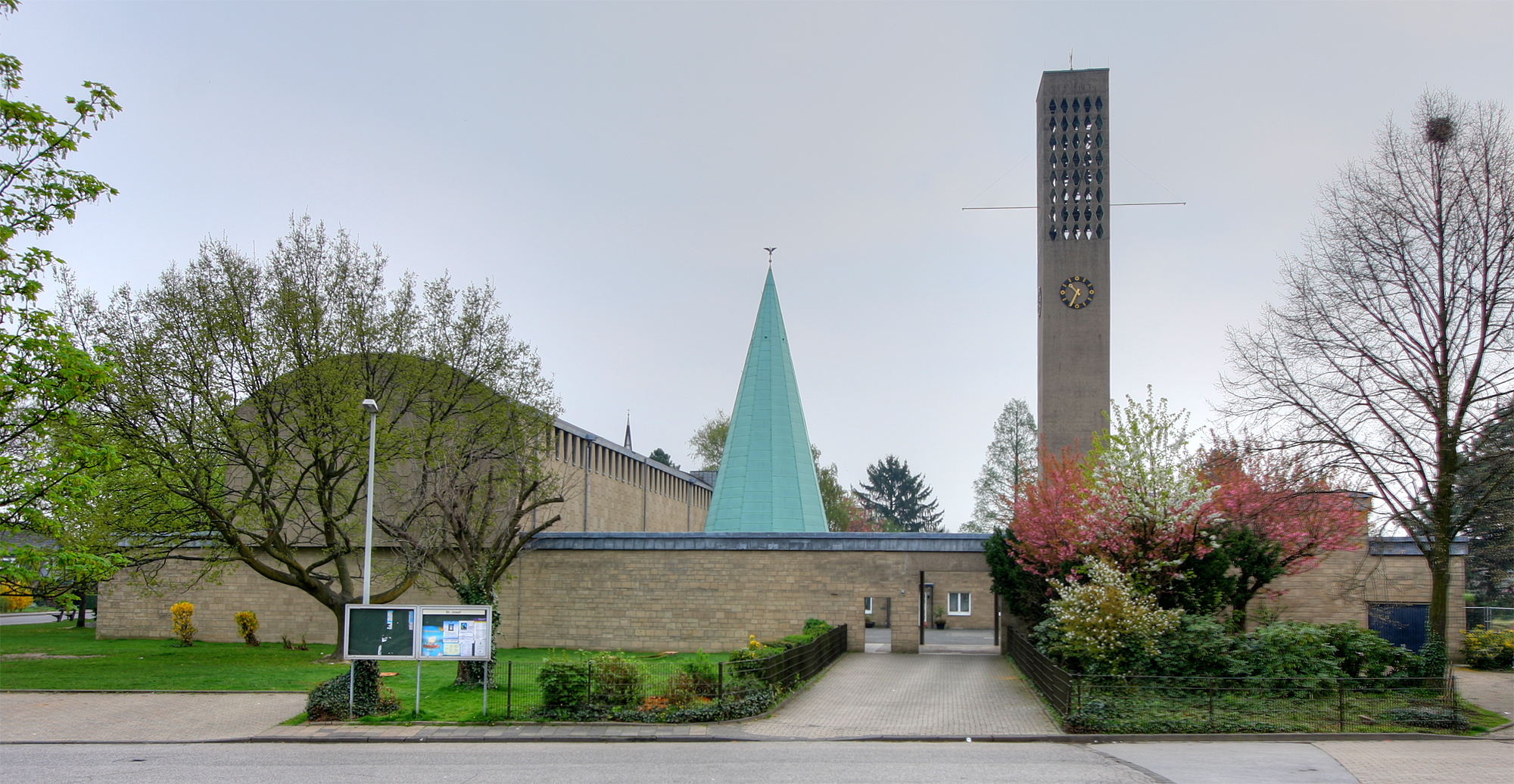 Kirche St. Joseph in Grevenbroich, Blick von Osten. Architekt: Gottfried Böhm